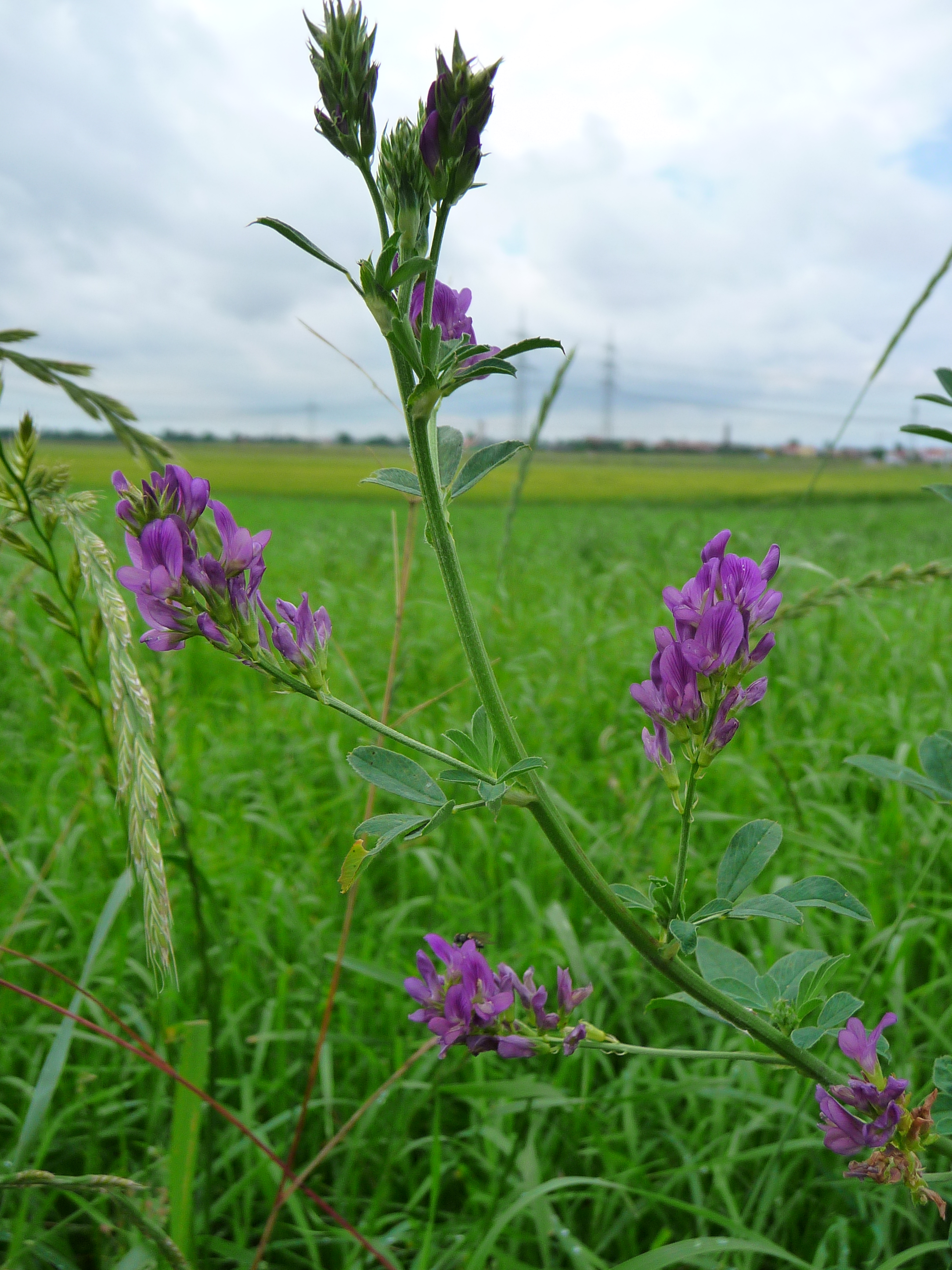 Bastard-Luzerne (Medicago × varia) am Rand eines Feldes, fotografiert in Plankstadt (Baden-Württemberg, Deutschland)